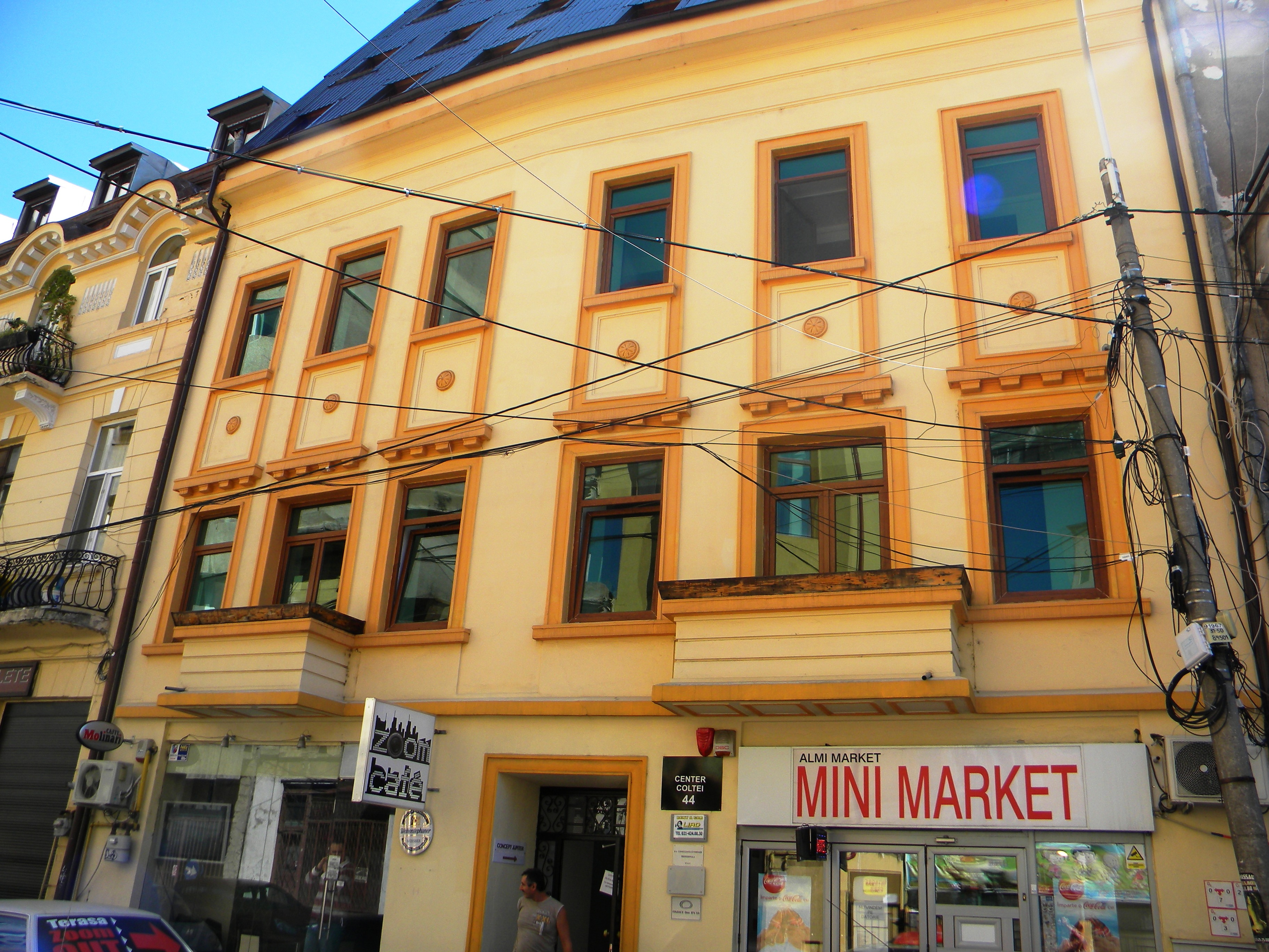 Bucuresti, Romania, Imobil pe Str. Coltei nr. 44, sector 3